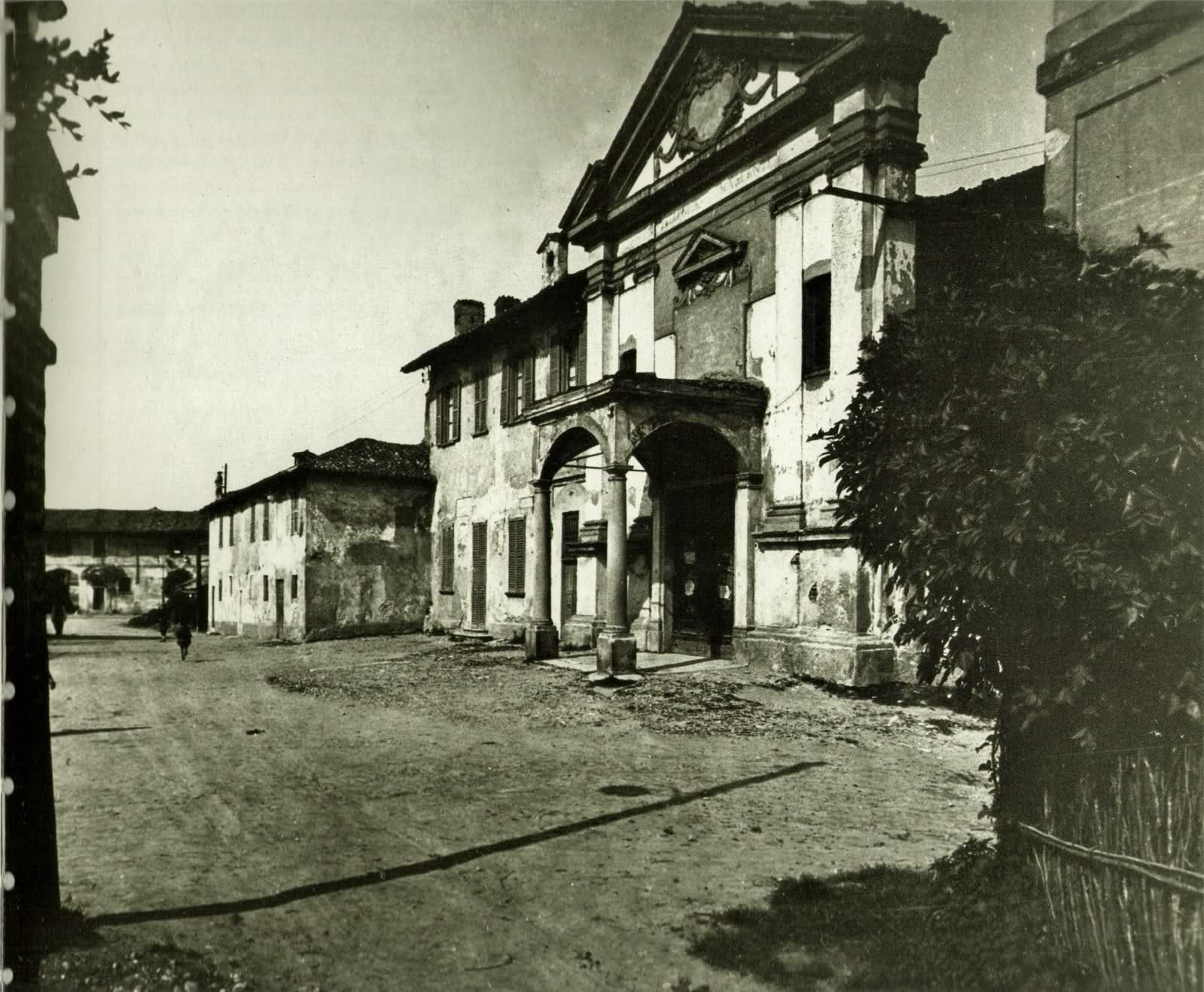 Il piccolo borgo rurale di Calvairate alla periferia di Milano, oggi scomparso. Si trovava nell'area dell'attuale piazzale Martini.